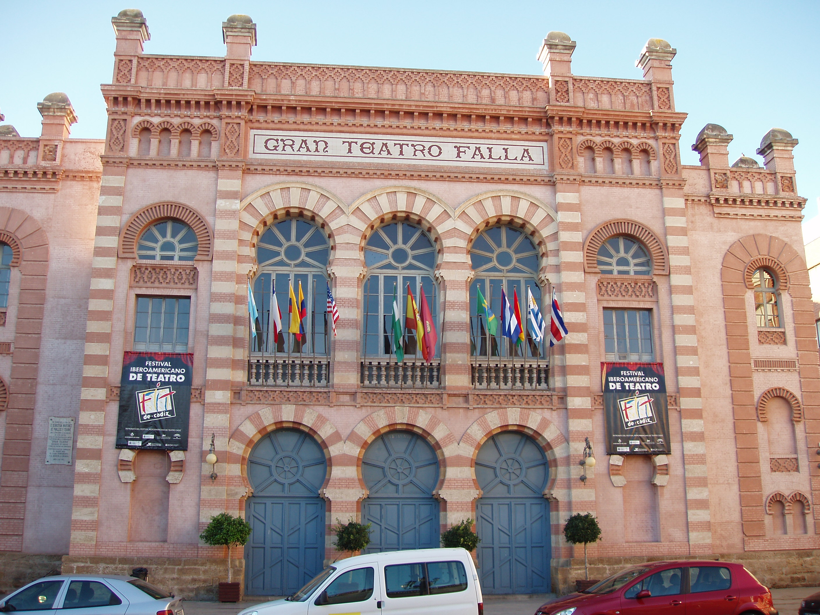 Gran Teatro Falla de Cádiz durante el FIT (FESTIVAL IBEROAMERICANO DE TEATRO)